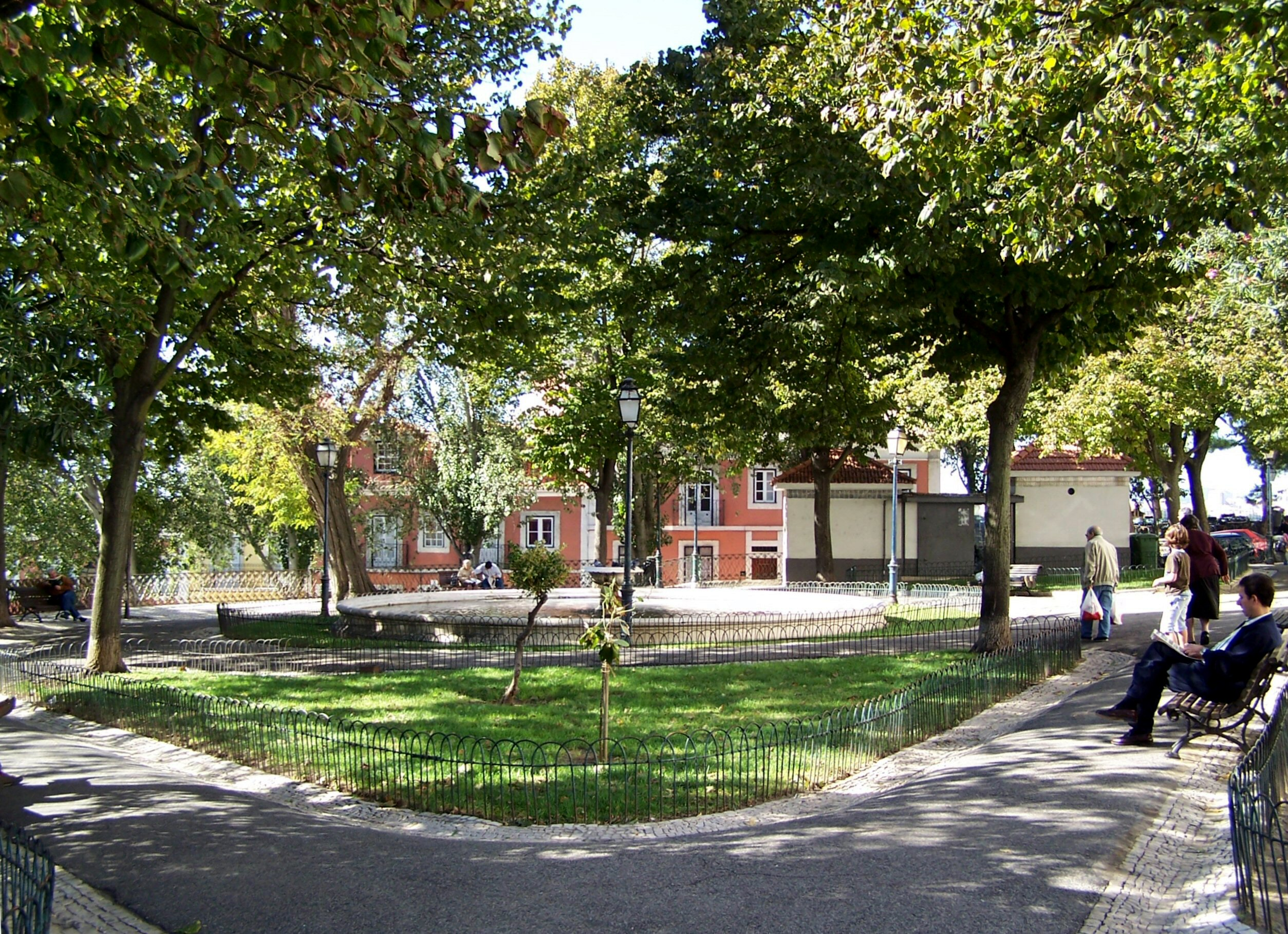 Lisboa - Jardim no Largo da Graça